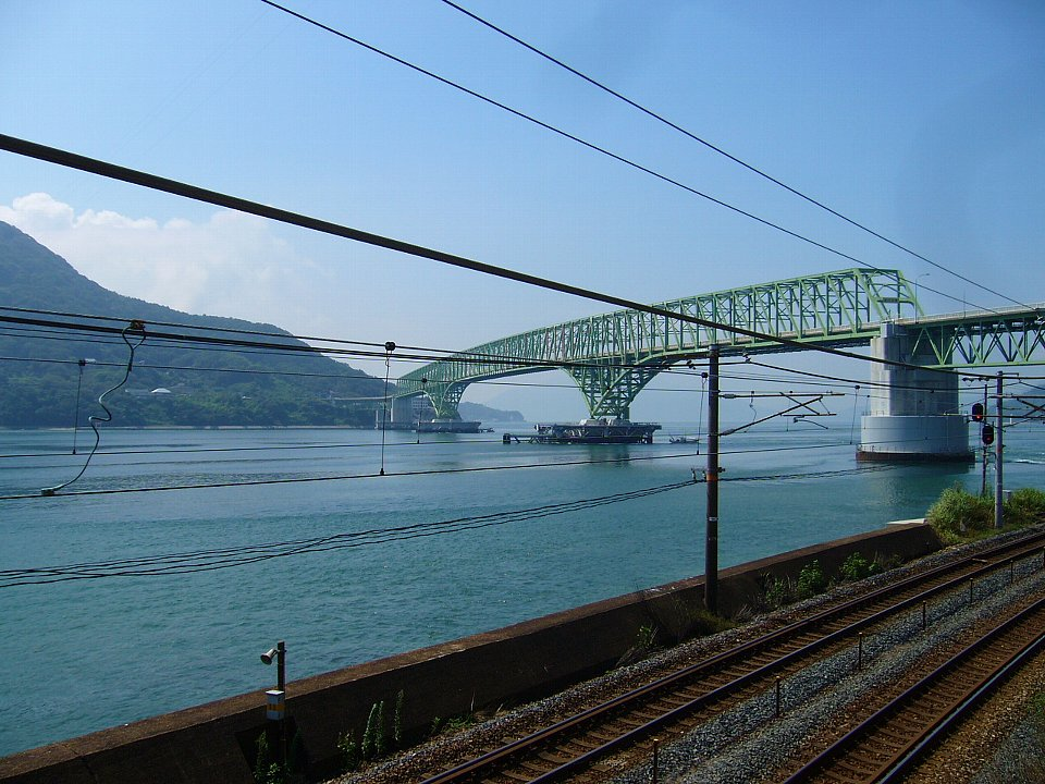 大畠瀬戸と大島大橋 山口県柳井市 右手は山陽本線と国道188号 2006年8月23日 Bakkai撮影 Category:日本の海域画像Category:山口県の画像